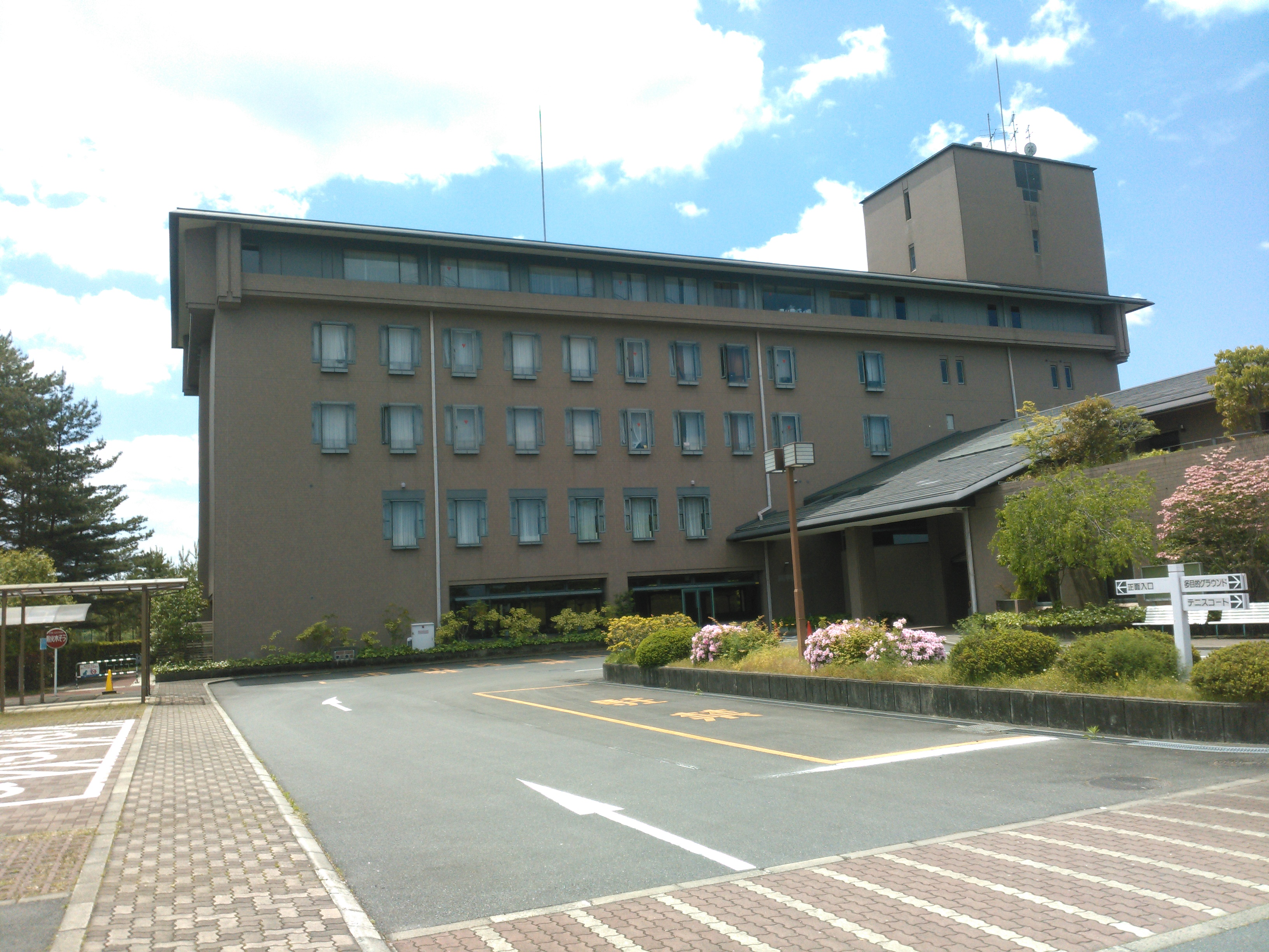 同志社大学 多々羅キャンパス 本館